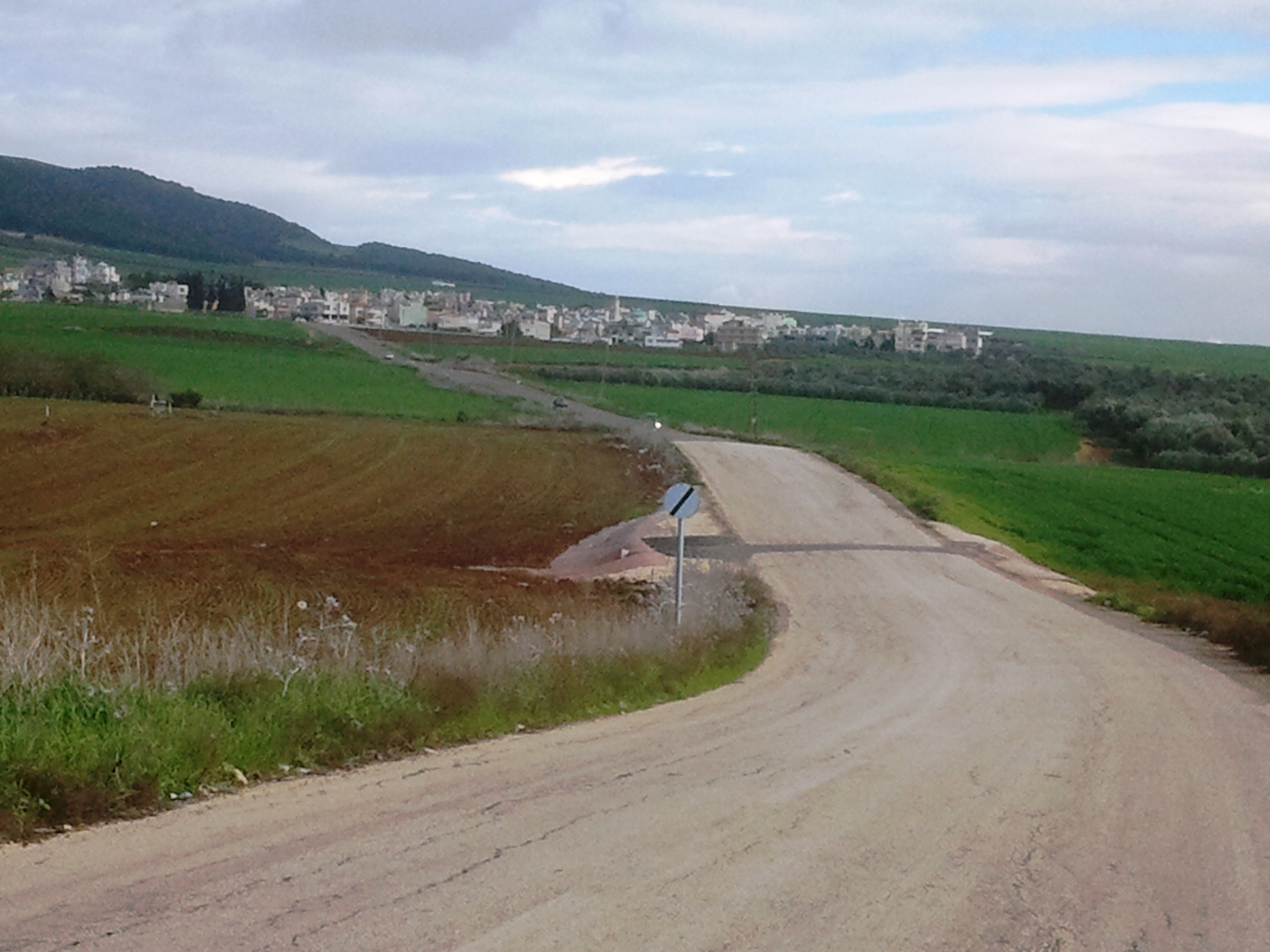 סולם (בערבית: سولم) הוא כפר ערבי באזור הצפון ליד העיר עפולה השייך למועצה אזורית בוסתן אל-מרג'. תצפית מגבעת המורה